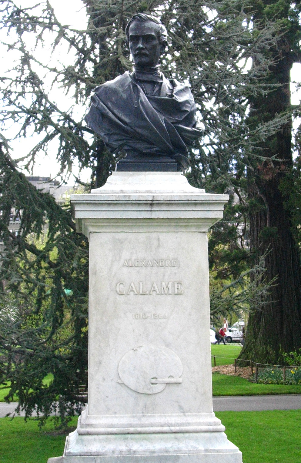 Le buste d'Alexandre Calame à Genève